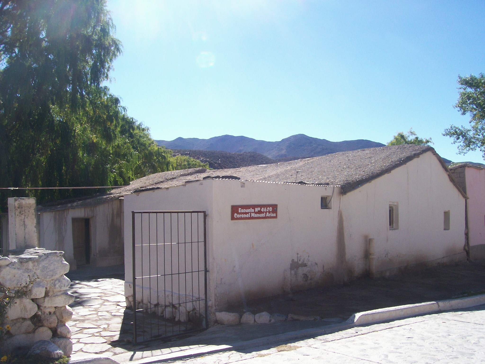 Vista de la escuela de Santa Rosa de Tastil.